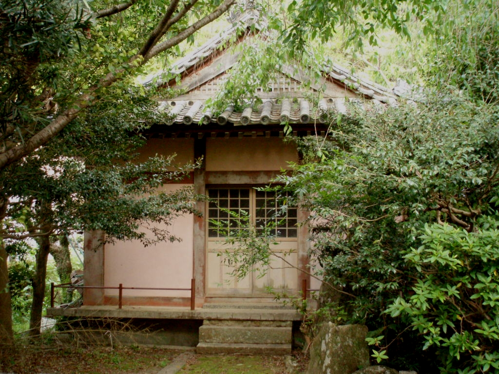 妙心寺堂舎